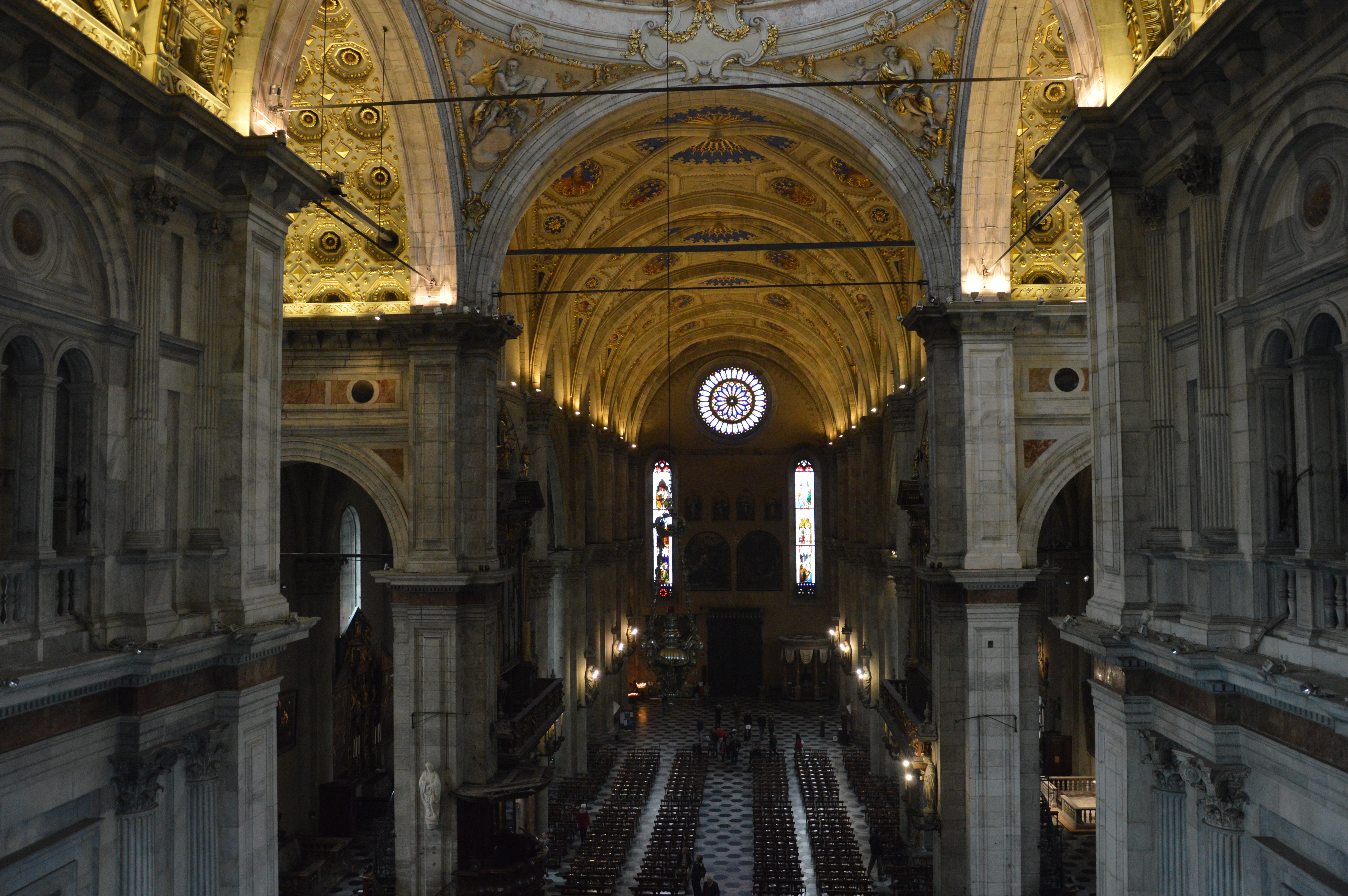 Interno del Duomo di Como visto dai camminamenti sotto la cupola This is a photo of a monument which is part of cultural heritage of Italy.